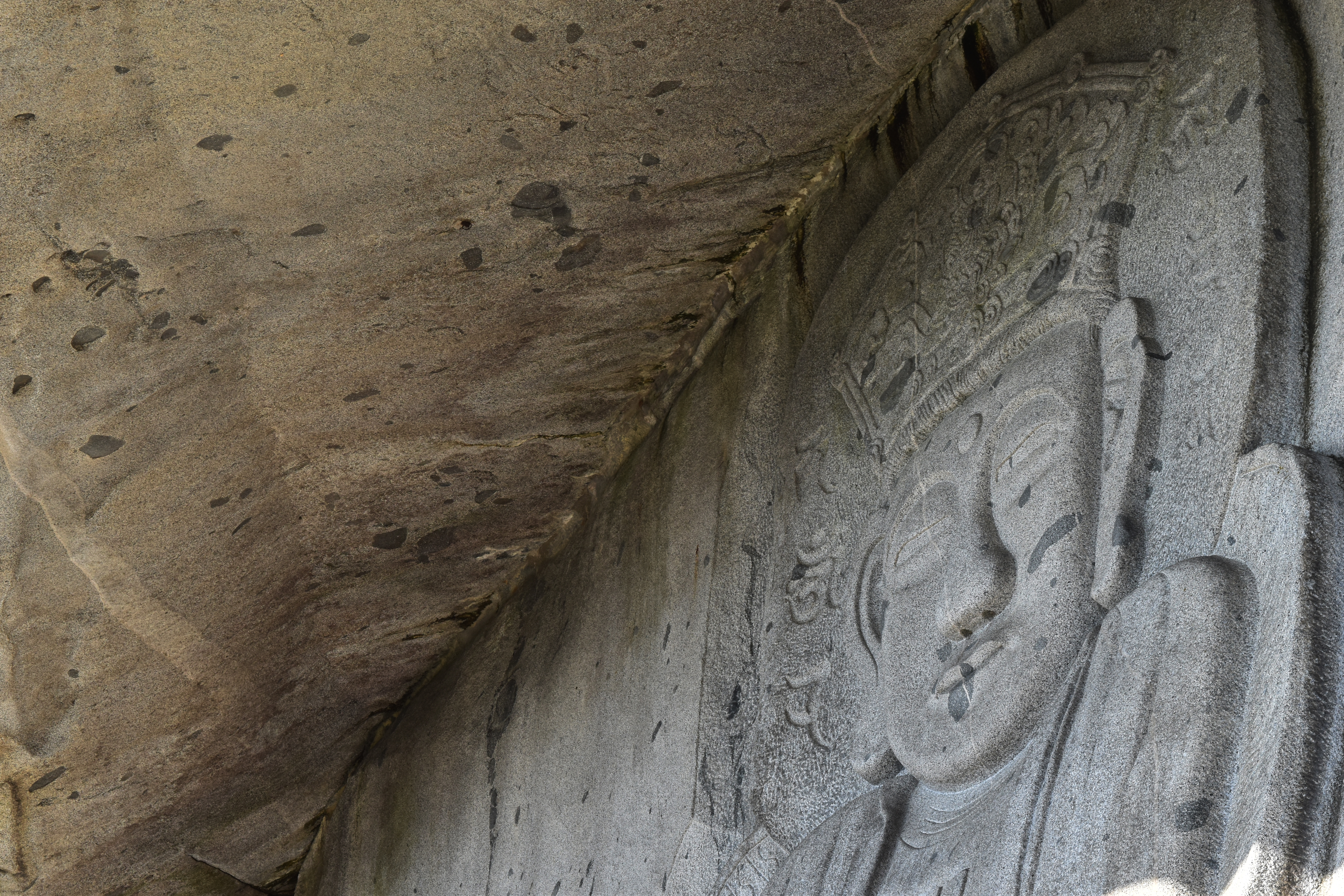 보문사마애석불좌상